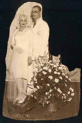 Casamento Yvonne e Ary. Rio, dia 26 de fevereiro de 1930